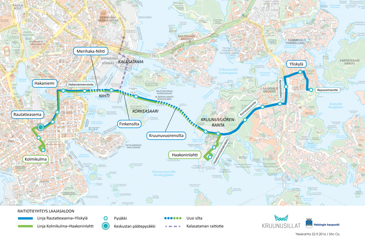 Ligne de tramway du projet Kruunusillat